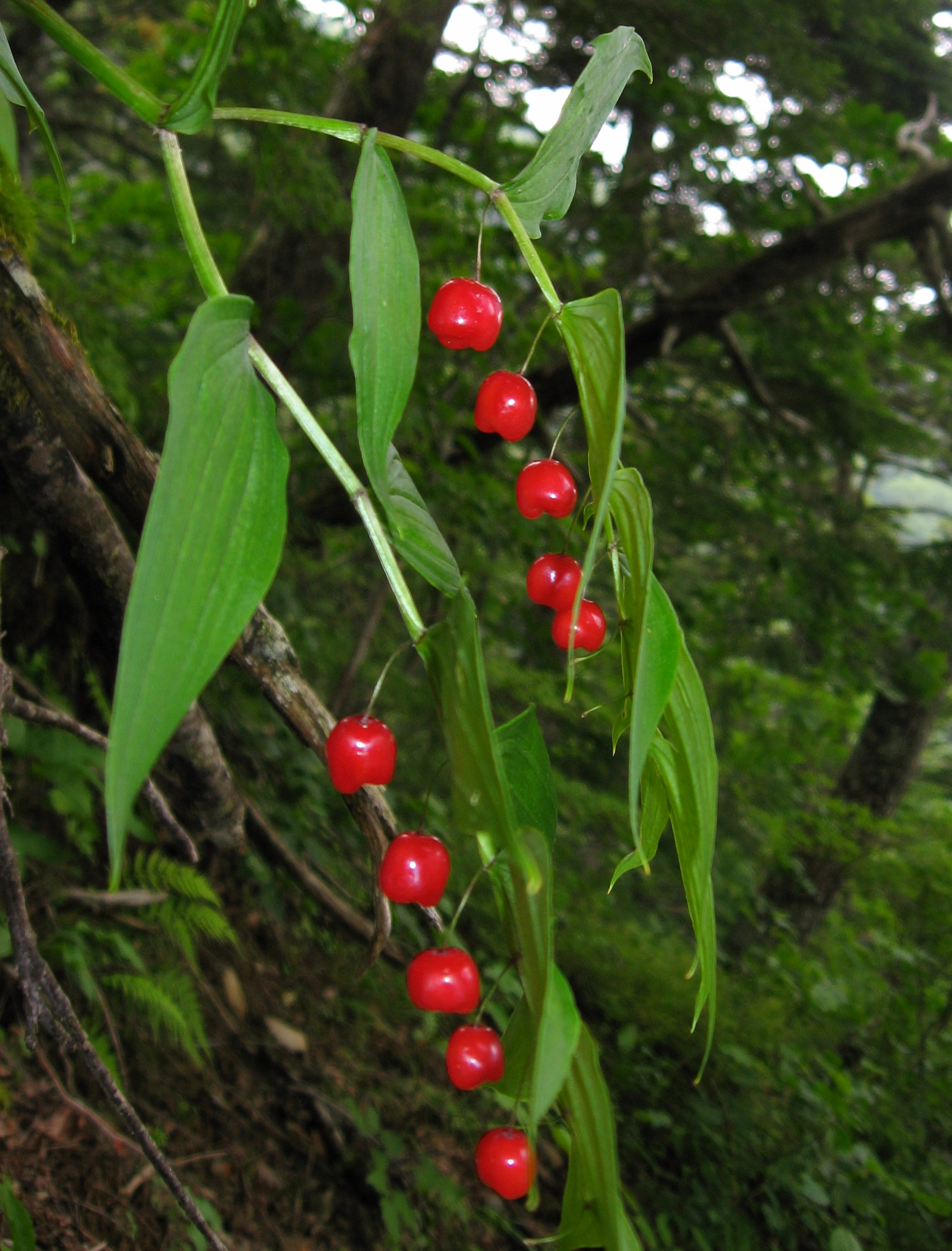 タケシマラン (学名：Streptopus streptopoides var. japonicus)